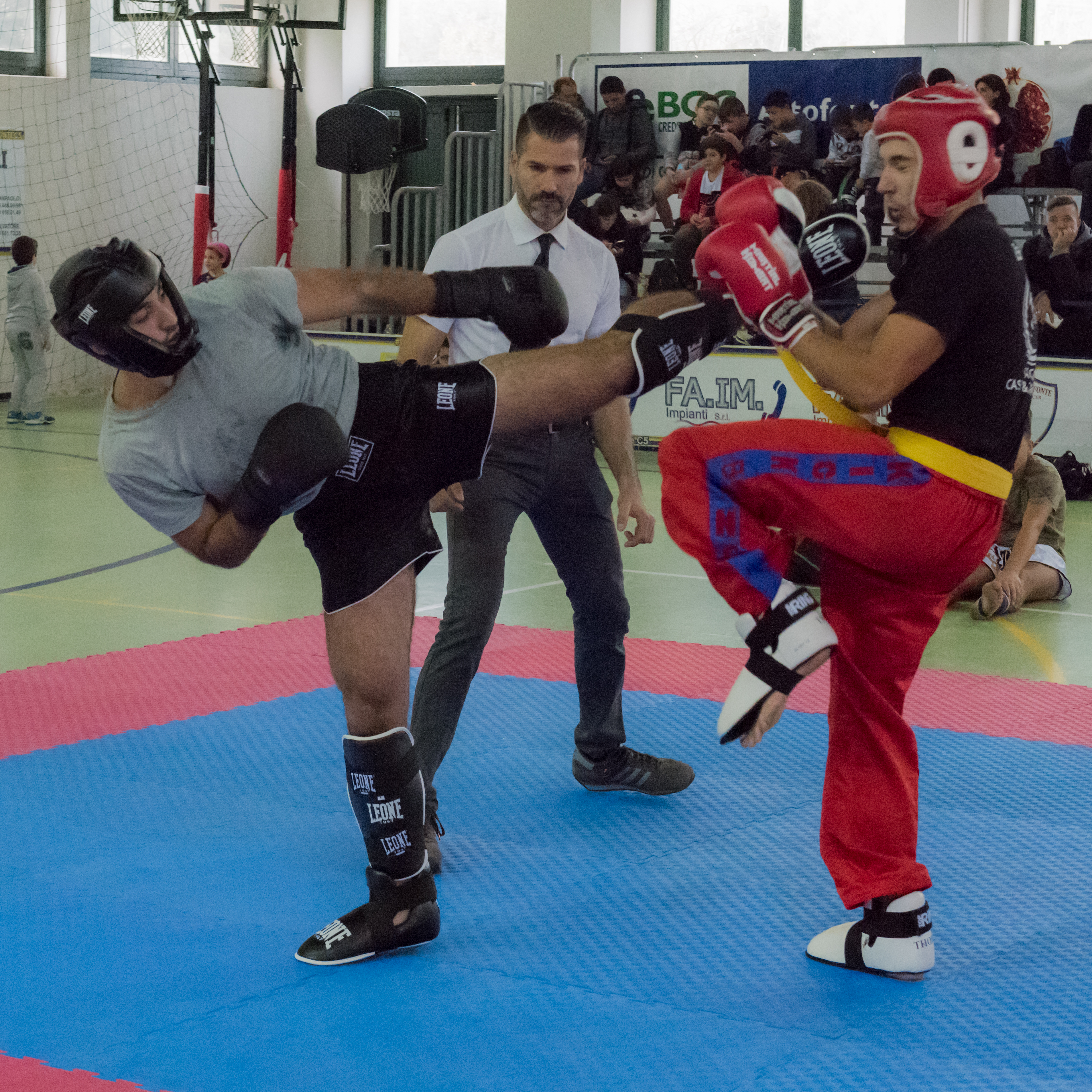 Una azione della gara nella Categoria light contact